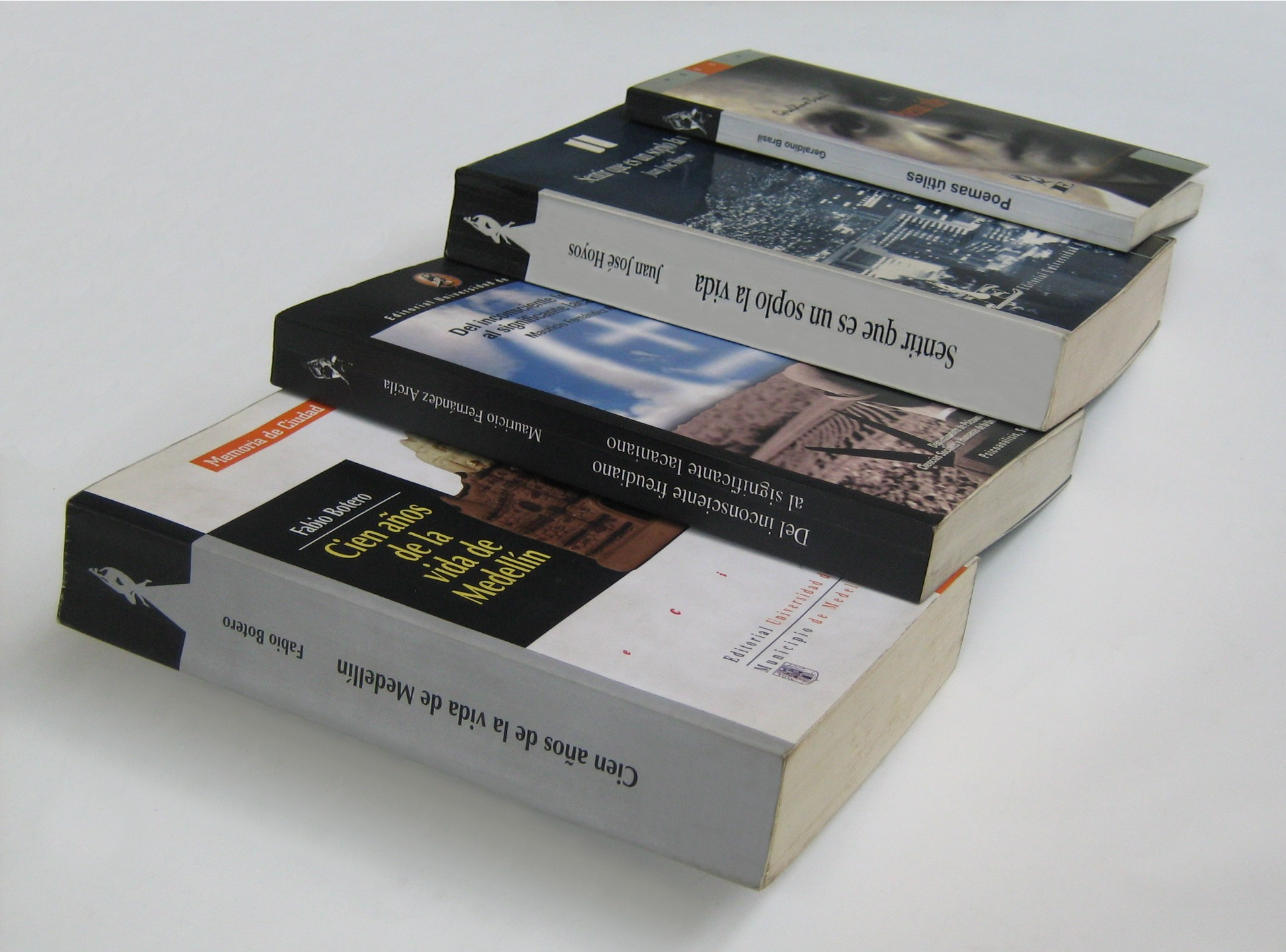 Libros de la Editorial Universidad de Antioquia impresos por la Imprenta Universidad de Antioquia. Medellín. Colombia